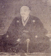 Sengoku daimyo Niwa Nagahide 戦国大名・丹羽長秀